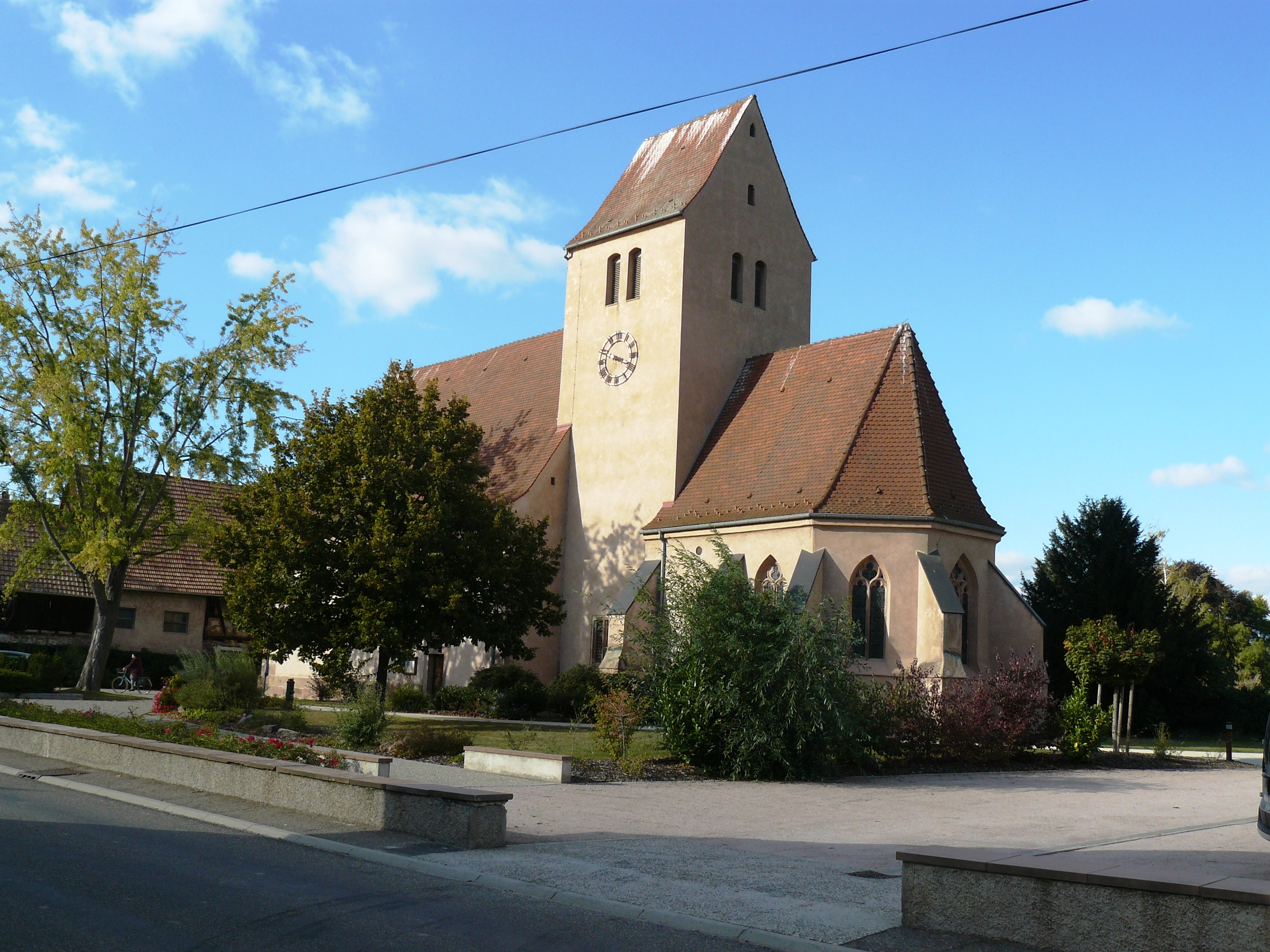 Église protestante de Muttersholtz